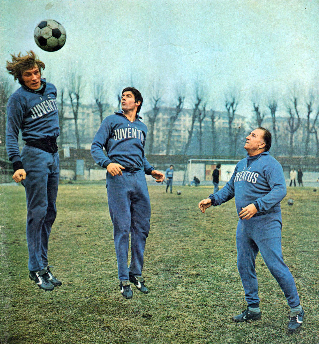 Da sinistra: i calciatori della Juventus, Francesco Morini e il capitano Sandro Salvadore, in allenamento al Campo Combi di Torino nel 1972, sotto lo sguardo del tecnico Čestmír Vycpálek.